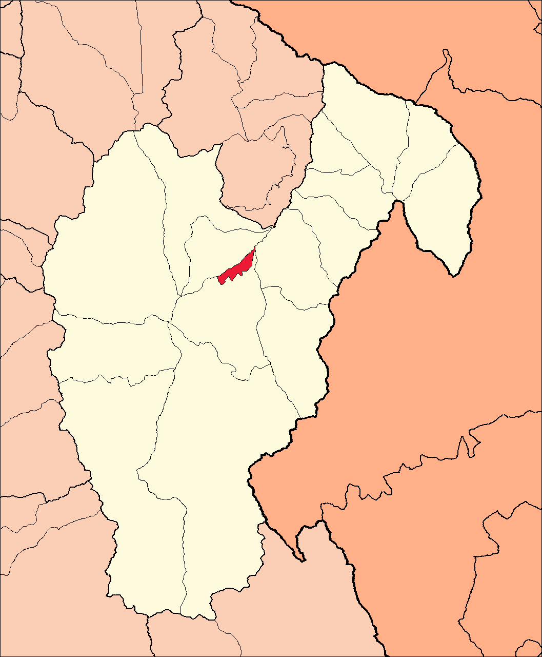 Área del distrito de Rahuapampa dentro de la provincia de Huari.